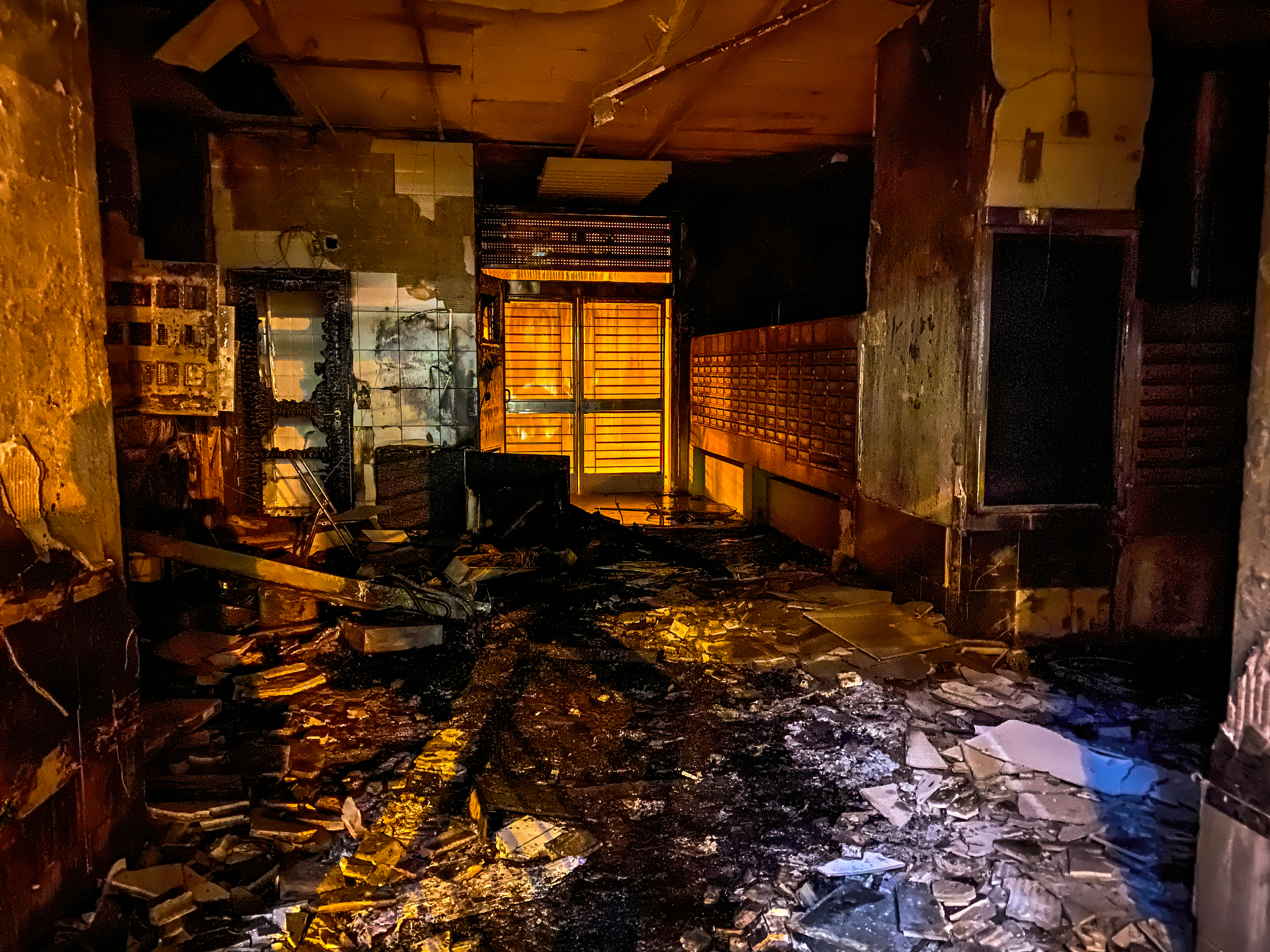 粉嶺有人不滿政府擬將未入伙的暉明邨用作隔離新型冠狀病毒患者的密切接觸者，下午起在附近一帶堵路，晚上更有人在暉明邨兩座大廈縱火，大批防暴警察到場驅趕。政府表示 ，在周三北區區議會進行討論前，將暫停相關準備工作。Studio Incendo